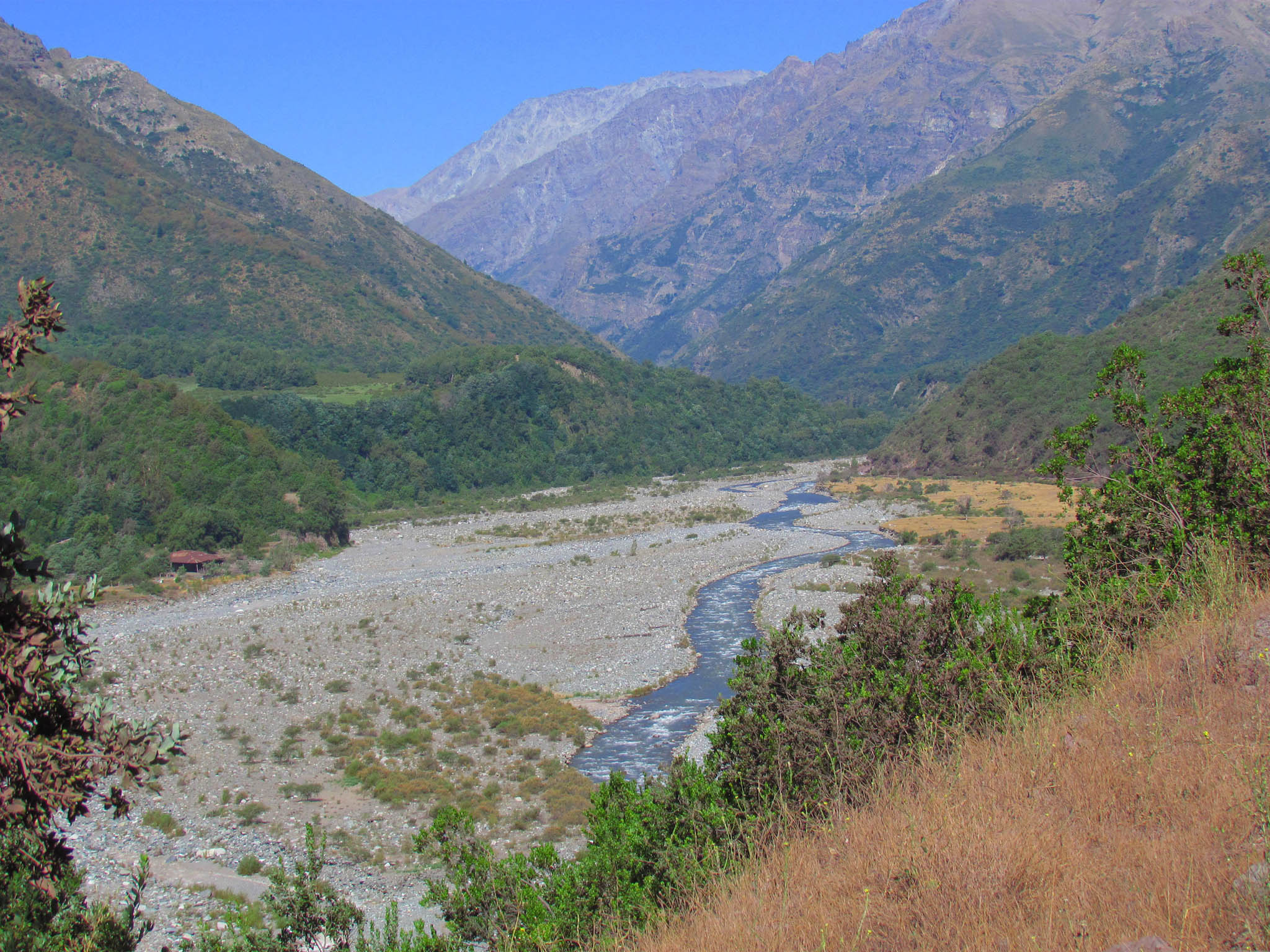 Los Queñes